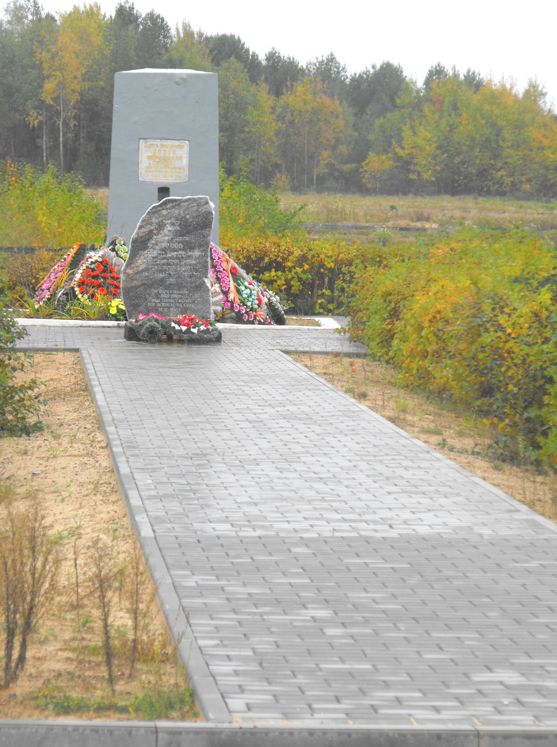 Мемориальный комплекс на одном из мест массовых убийств евреев - узников Слонимского гетто (Гродненская область). На этом месте только 14 ноября 1941 года гитлеровцами и полицаями были убиты и захоронены примерно 10000 евреев Слонима и близлежащих деревень. Расположен на Чепелевских полях - территории, расположенной в 500 метрах слева от трассы Р99 Барановичи-Слоним на 46 километре от Барановичей (не доезжая 1 километра до поворота налево на Чепелево, если двигаться со стороны Барановичей).